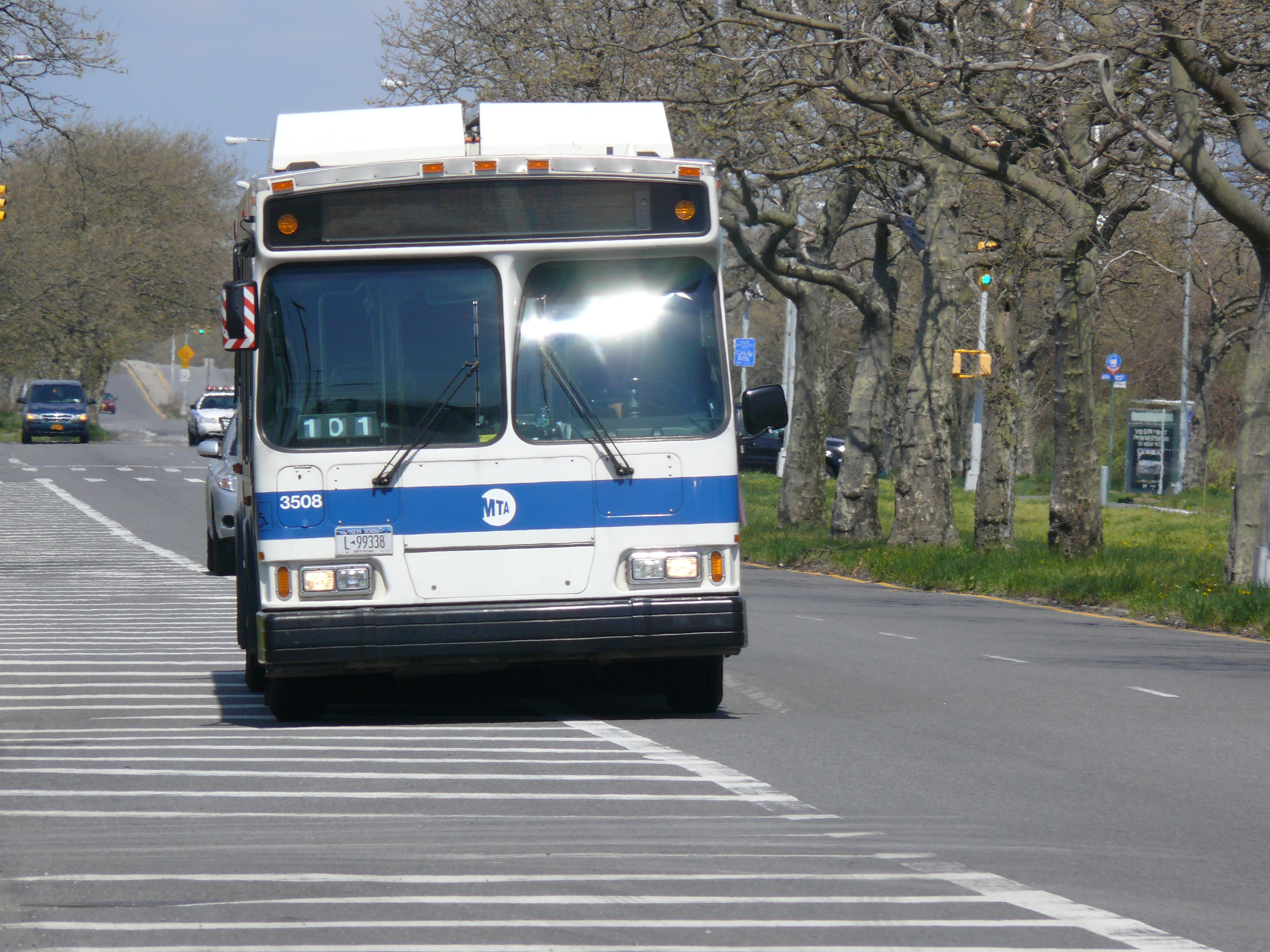 DaimlerChrysler Commercial Buses Orion VII (07.501) (semi-low floor, hybrid electric) Q35 bij de halte aan Floyd Bennett Field.